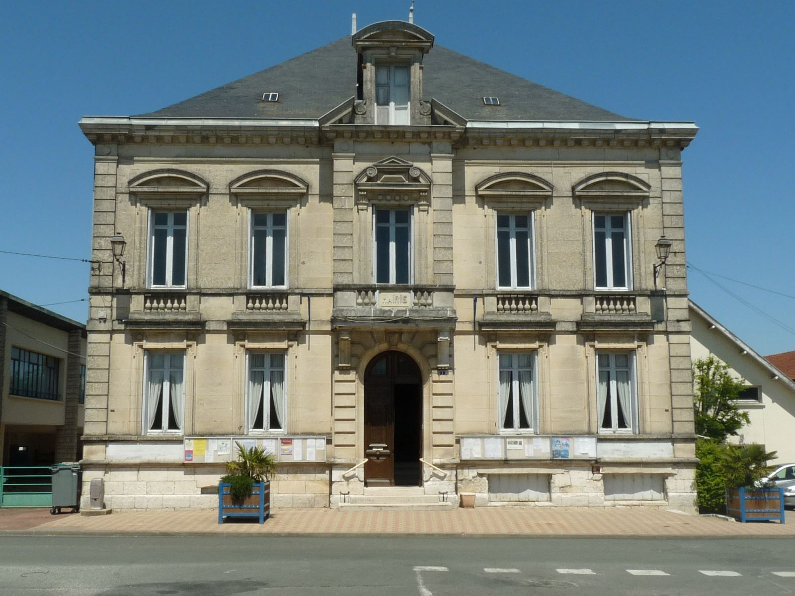 mairie de St-Aigulin (Charente-Maritime, France)